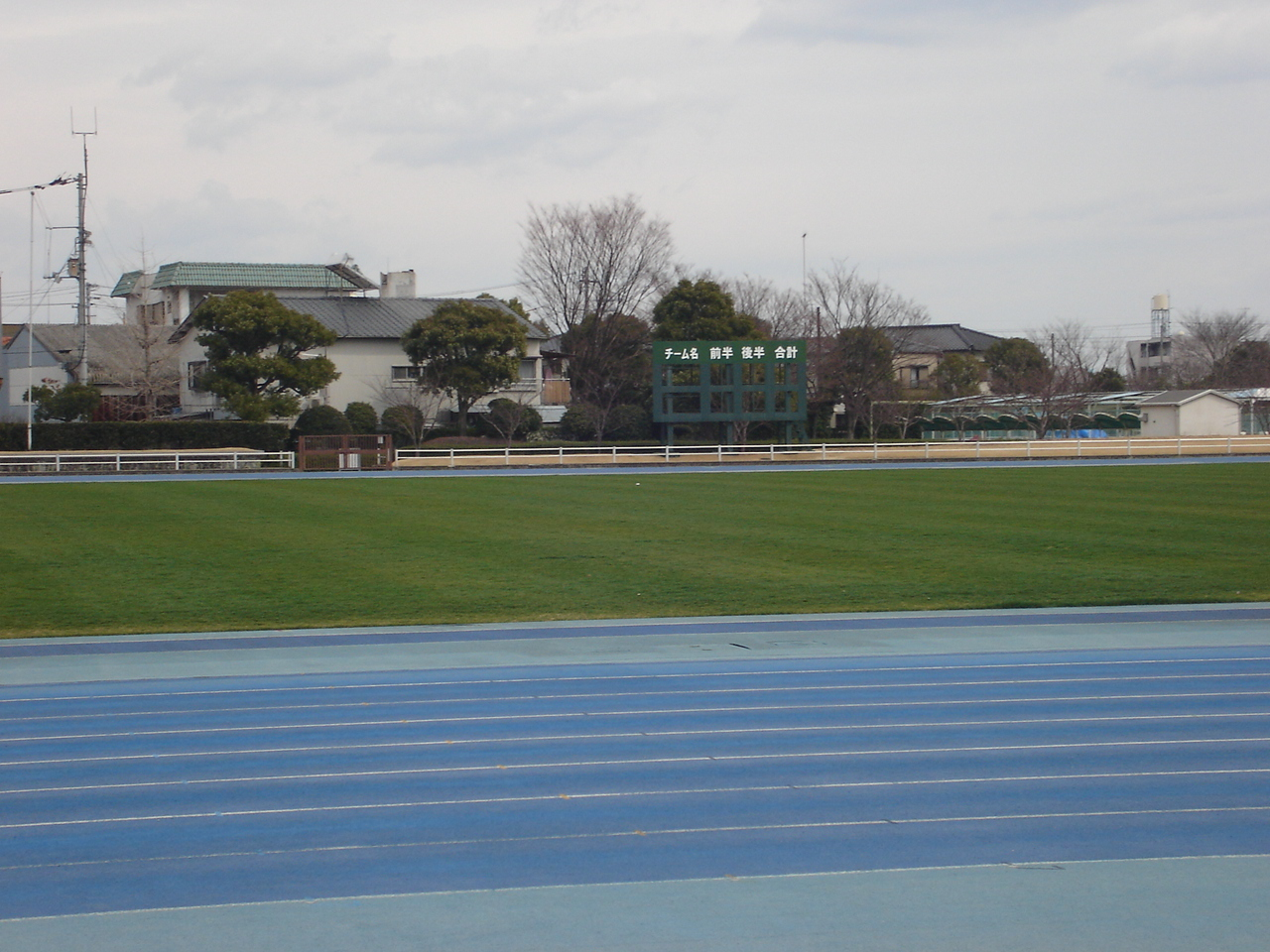 徳島市陸上競技場。 - 日本国徳島県徳島市にある競技場。